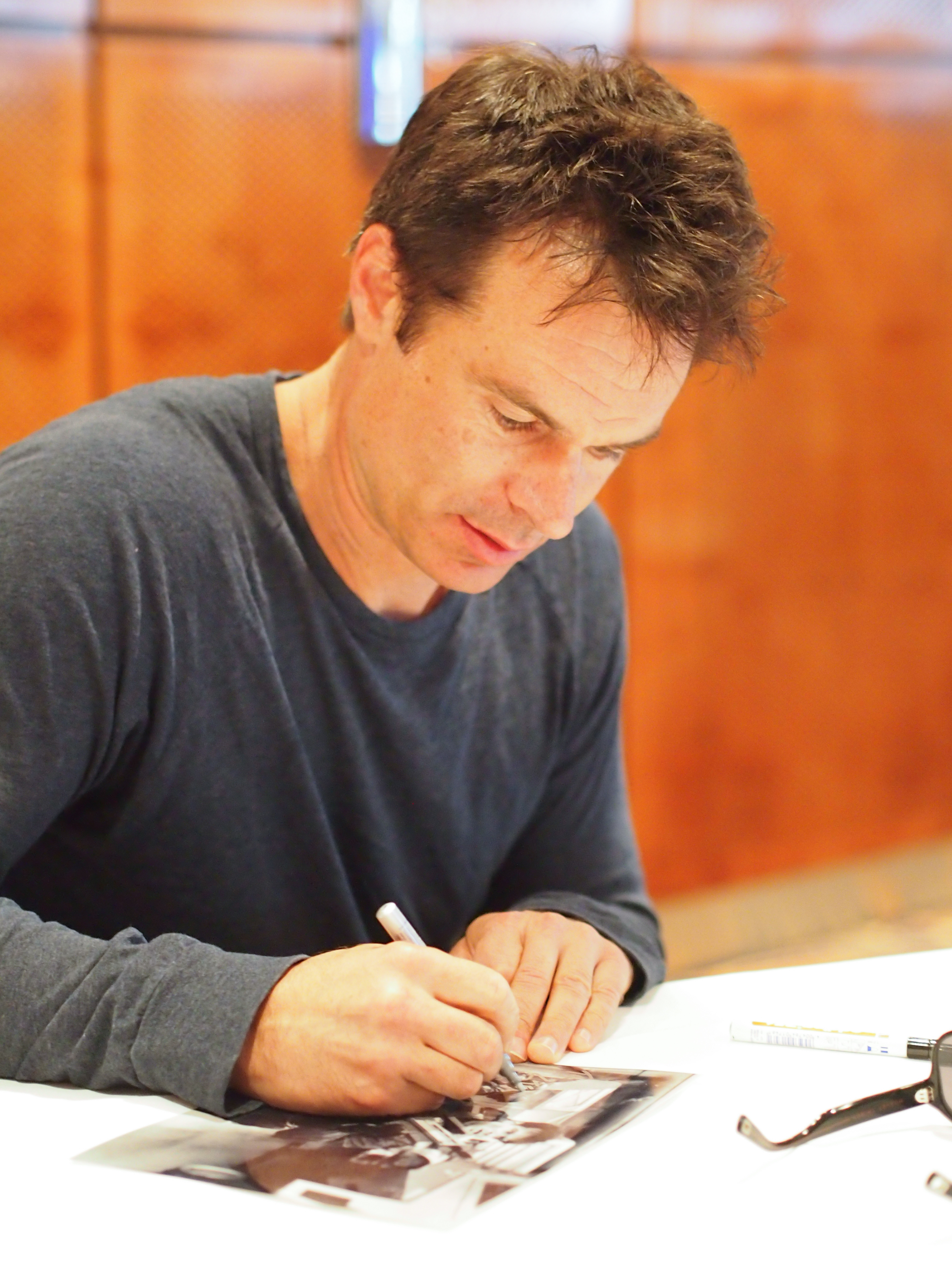 Patrick Muldoon bei der FedCon 22, 9. Mai bis 12. Mai 2013, Maritim-Hotel Düsseldorf